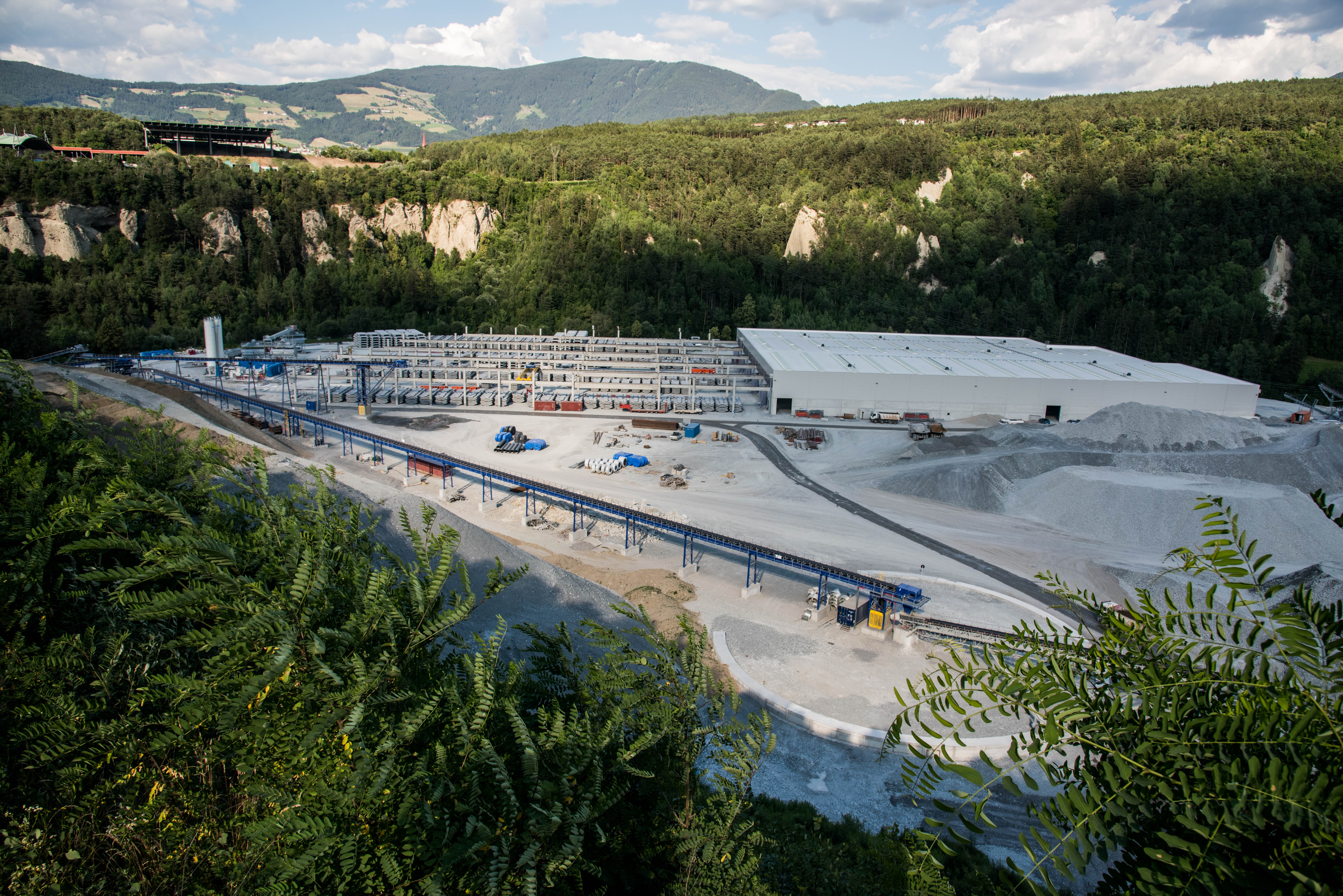 Hinterrigger